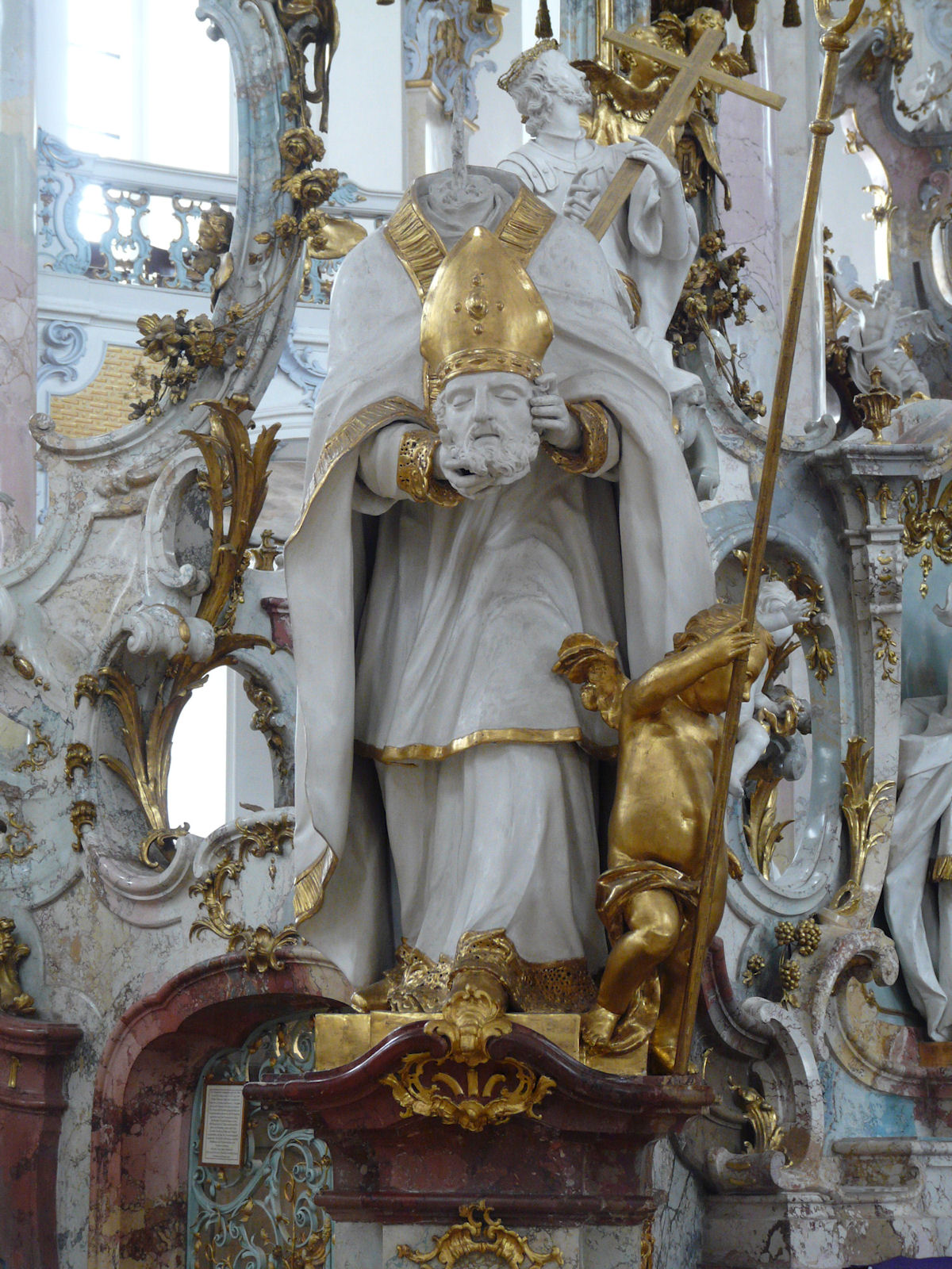 Altar of the Vierzehnheiligen. Die Basilika Vierzehnheiligen bei Bad Staffelstein im Landkreis Lichtenfels ist eine Wallfahrtskirchen in Oberfranken.A statue of one of the saints on the Altar of the Fourteen Holy Helpers. Basilica of the Fourteen Holy Helpers, Bad Staffelstein near Bamberg, in Bavaria, Germany